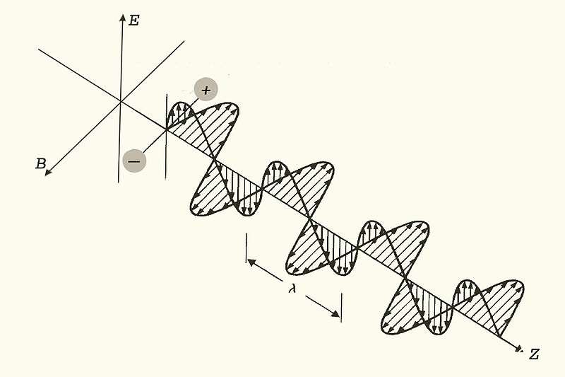 Схема генерации электромагниной волны